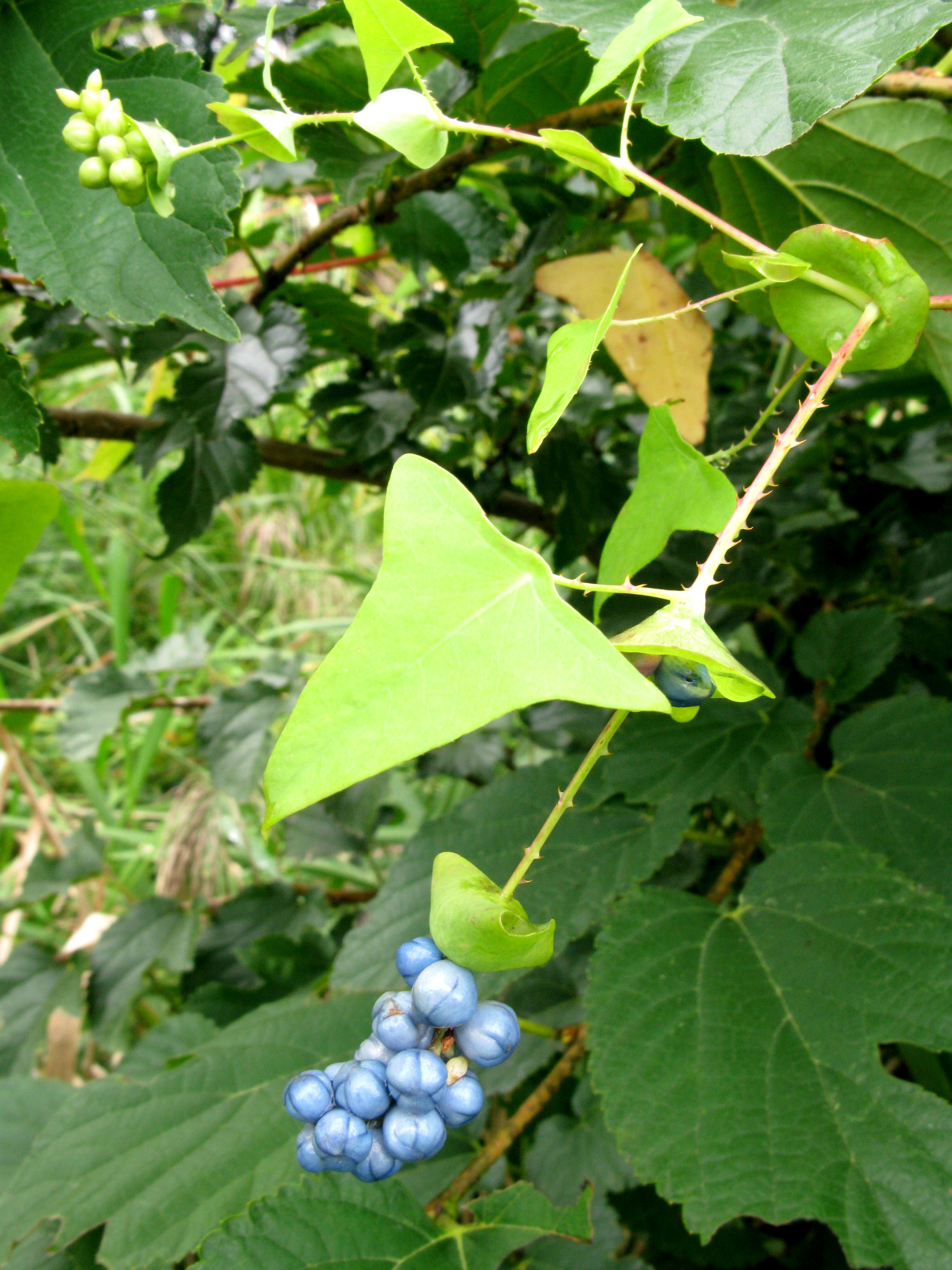 Polygonum perfoliata イシミカワ 福島県会津地方